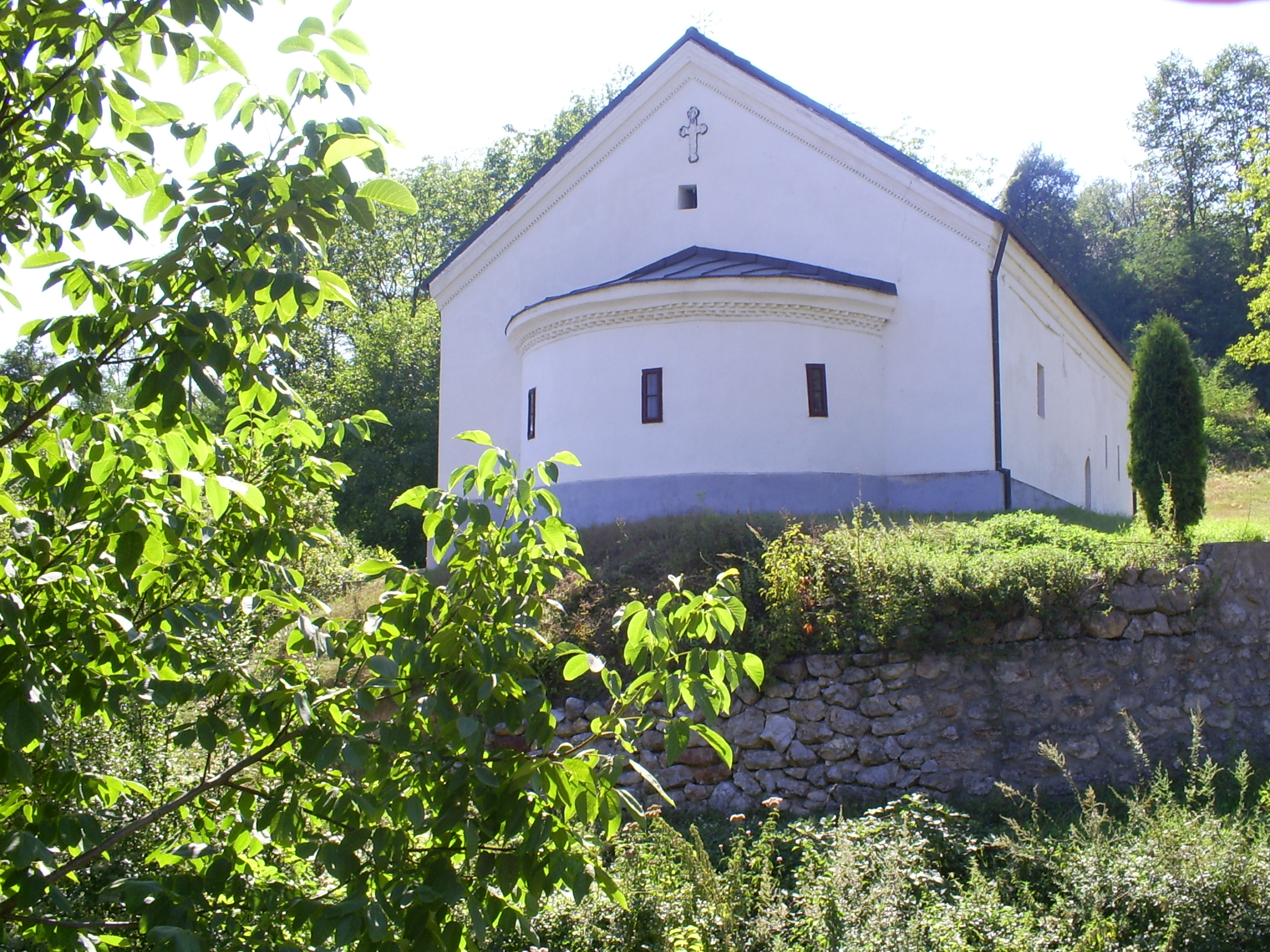 Црква посвећена светом Николи у селу Горњи Душник која је саграђена 1845. године, а освећена 1850. године. Иконостас у цркви је постављен 1871. године